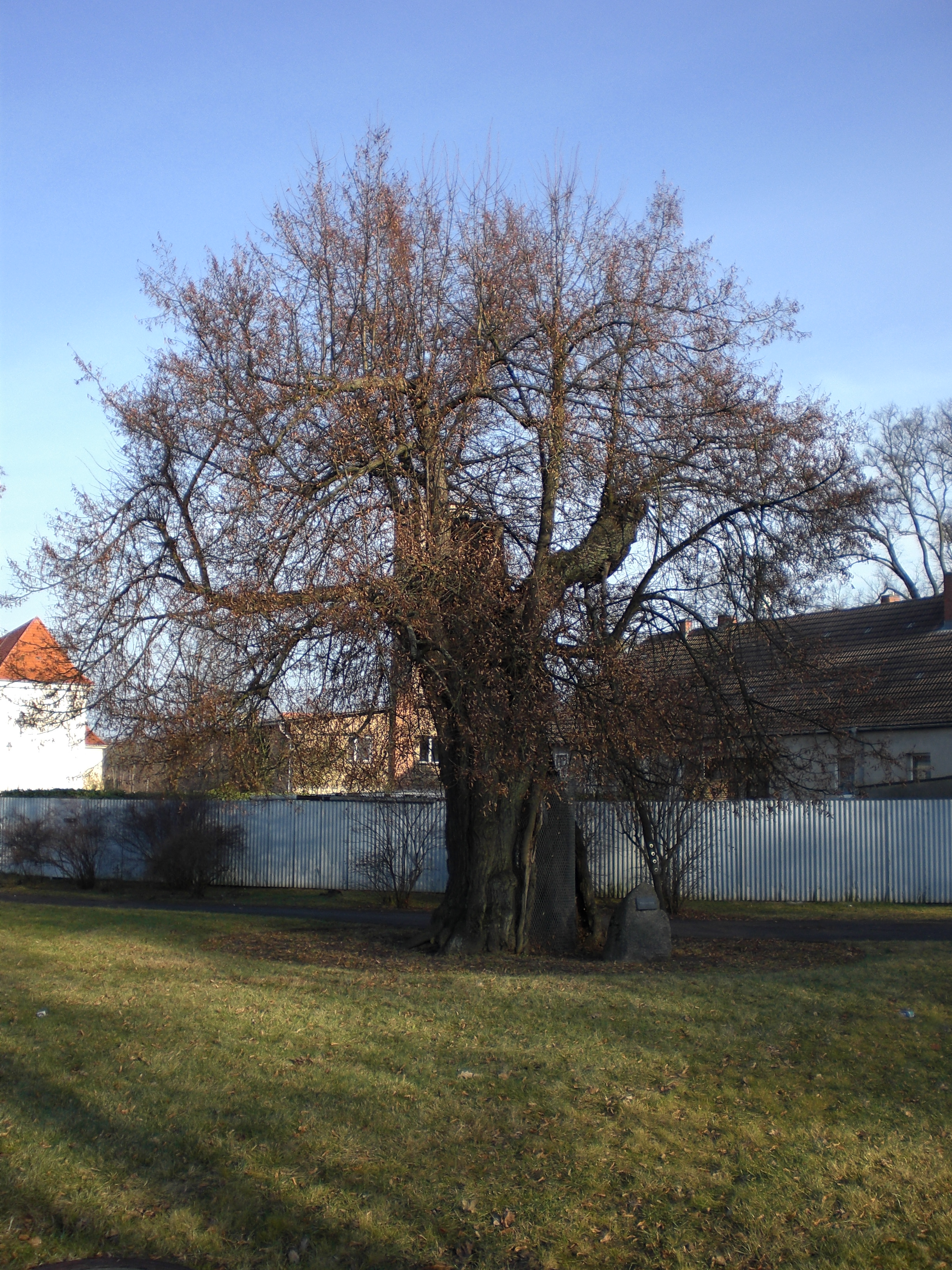 Gerichtslinde Zehdenick (Landkreis Oberhavel, Brandenburg)